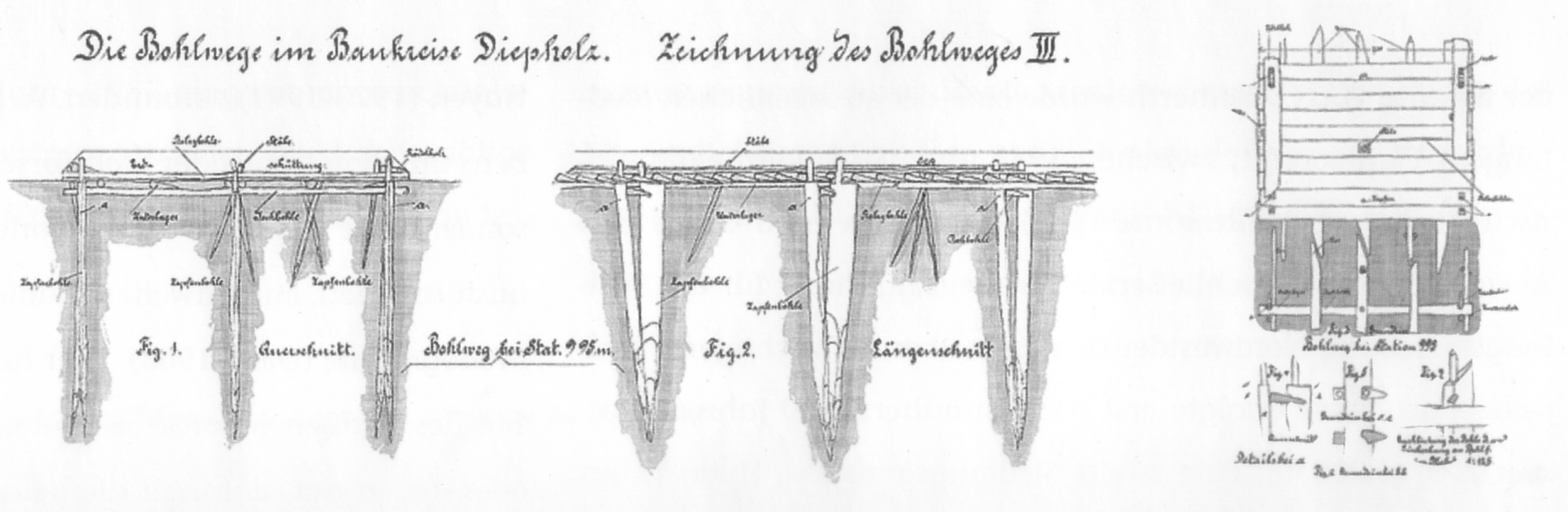 Zeichnung des Ausgrabungsbefundes des Moorweges Pr 6 im Aschener Moor